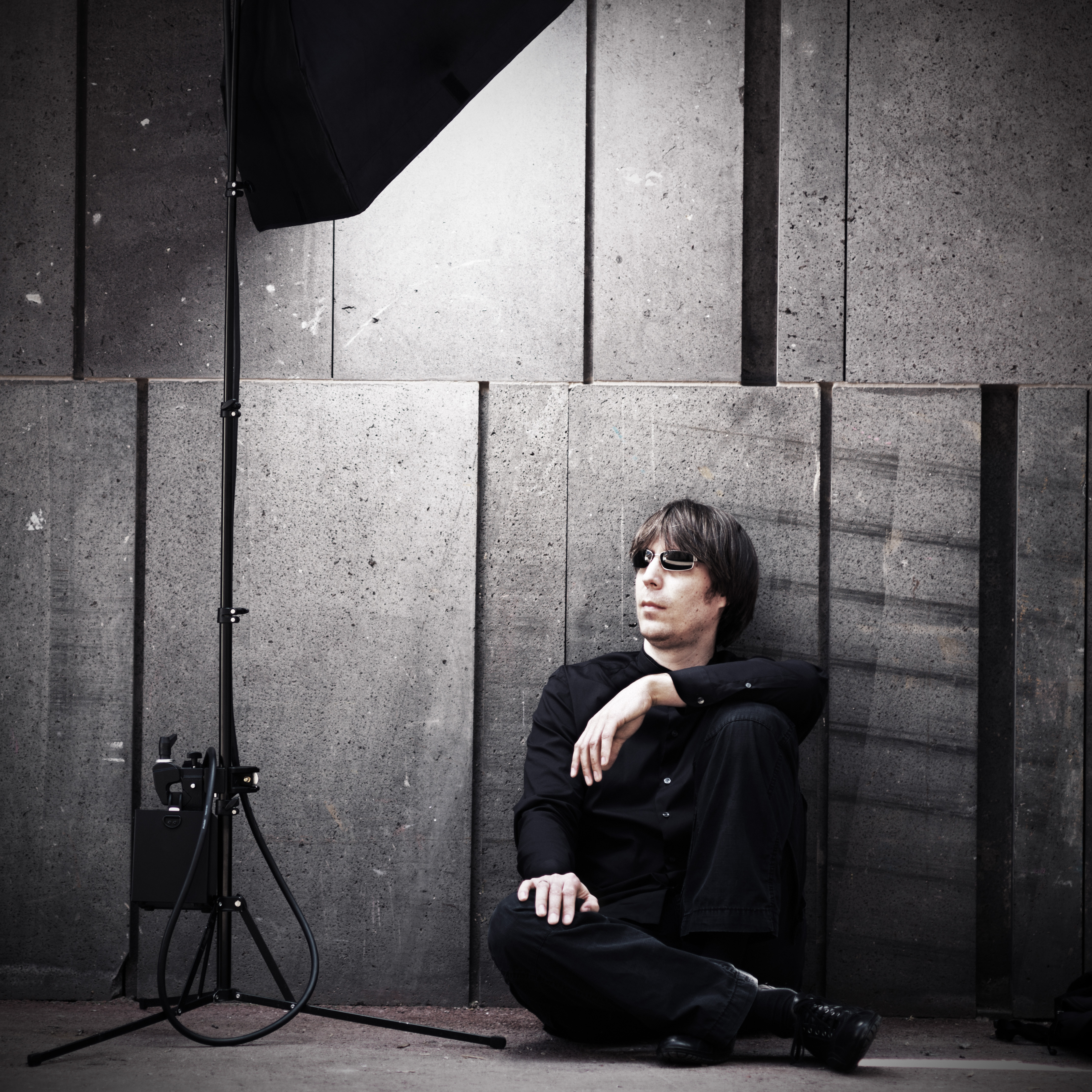 Stefan Poiss, THYX